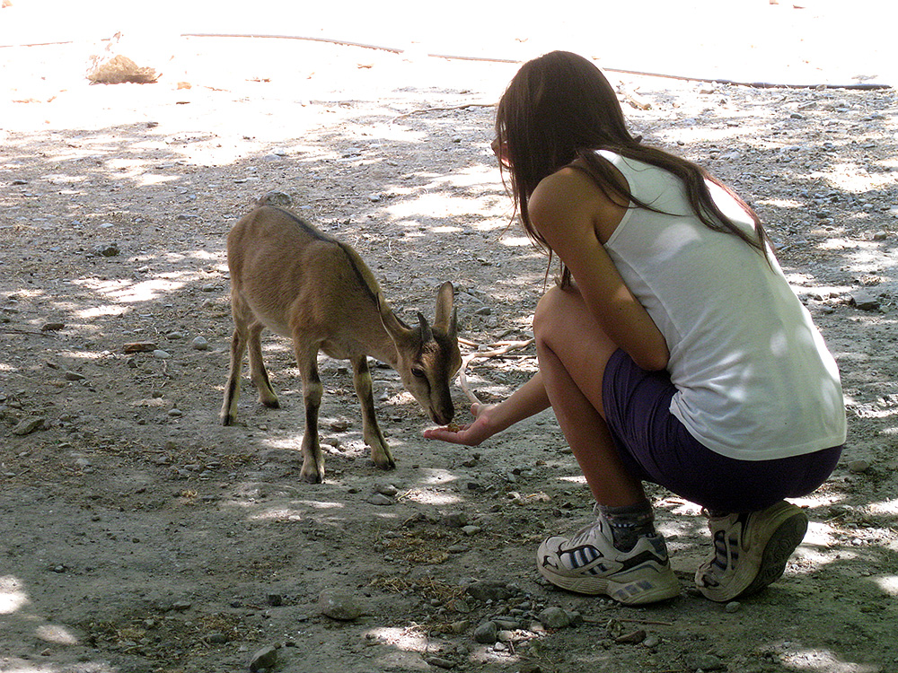 Una tipica capretta Kri Kri